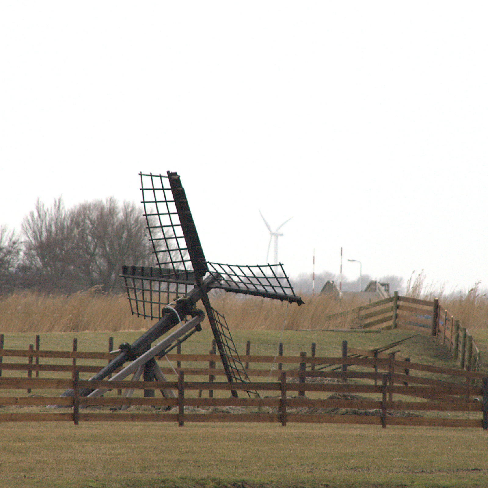 Allingawier: Tjasker De Izeren Ko